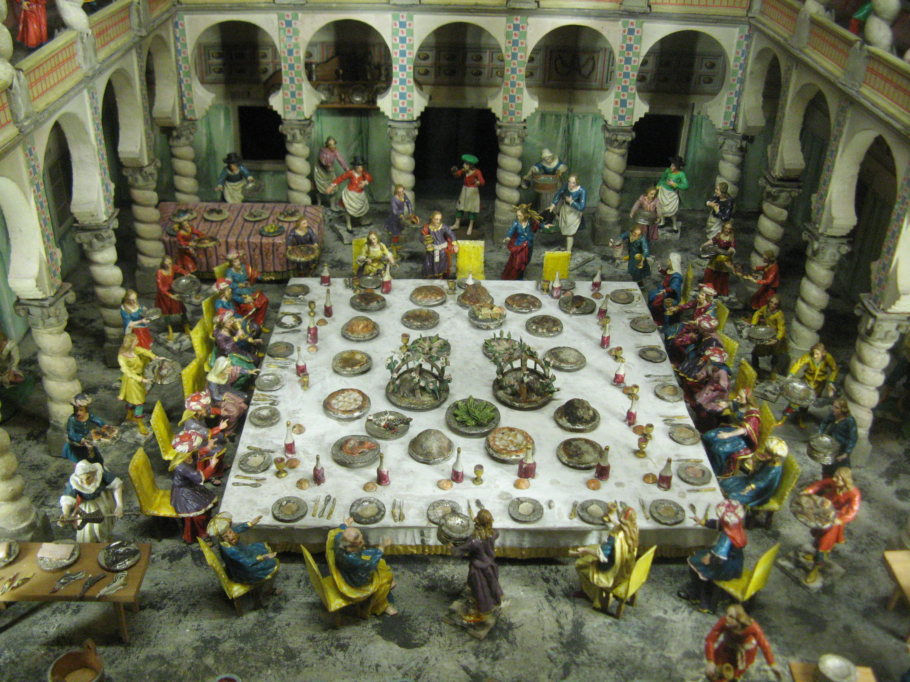 Augustin Alois Probst: Hochzeit zu Kana, Krippenmuseum Brixen